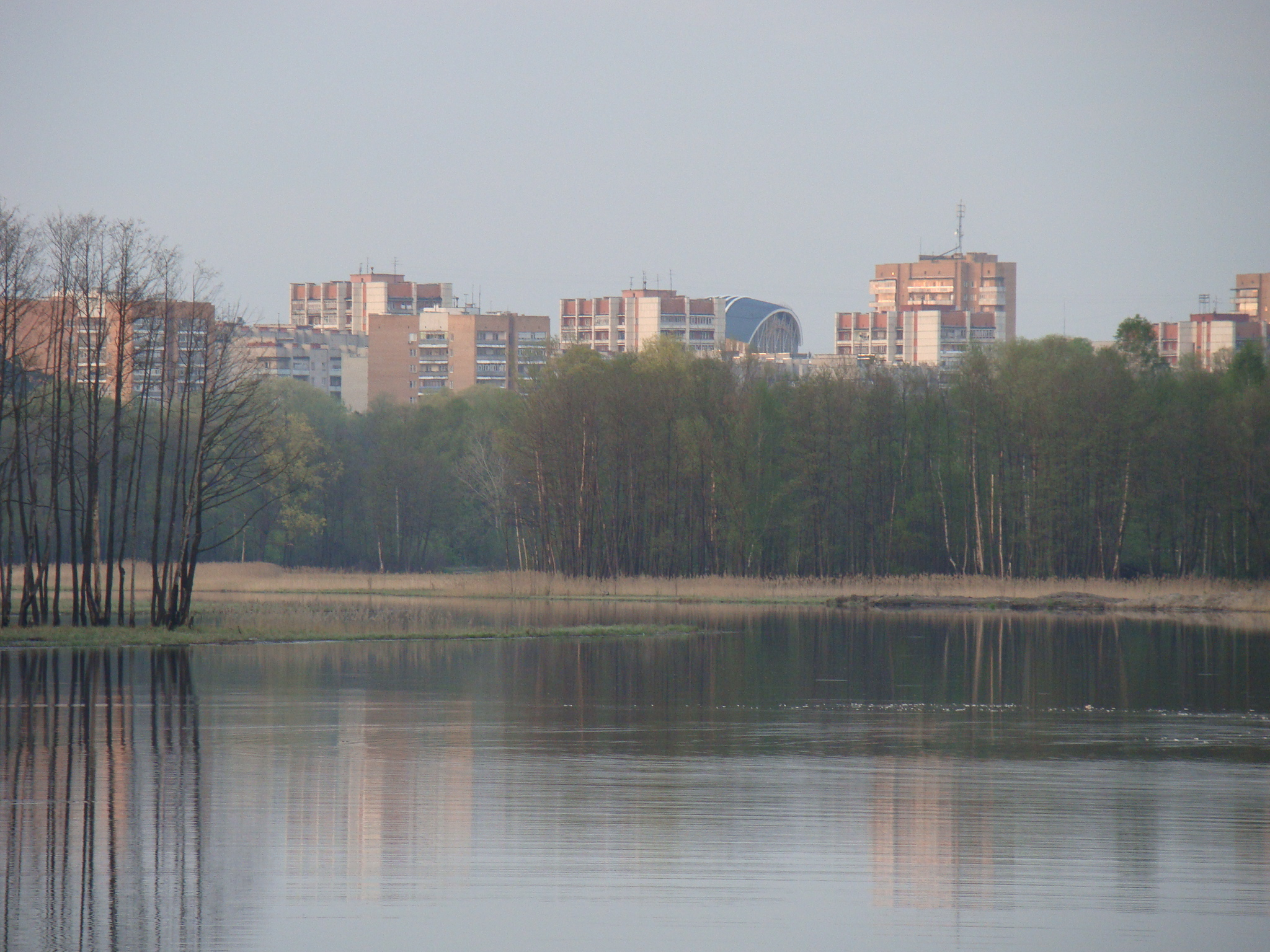 Берег реки Сатис